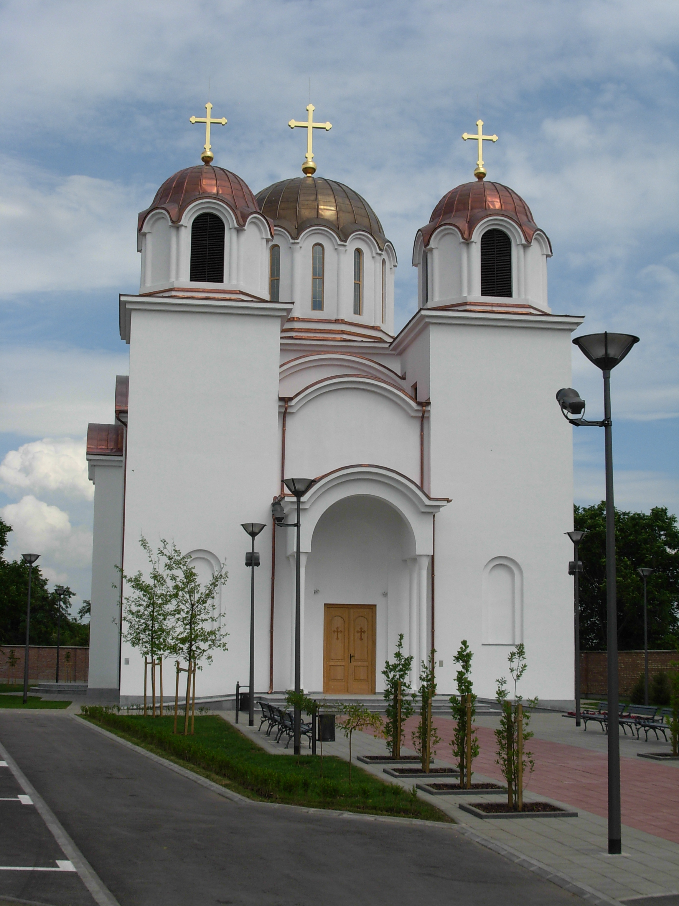 Crkva Svete Petke u Petrovaradinu, jun 2012.